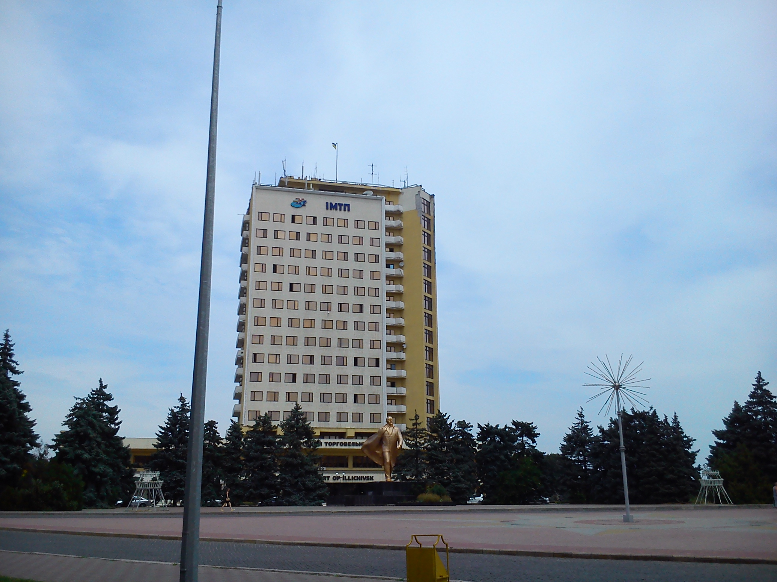 Пам'ятник В.І. Леніну, Іллічівськ, пл. С. Стребка